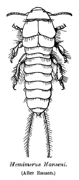 Hemimerus hanseni, Earwig, Dermaptera